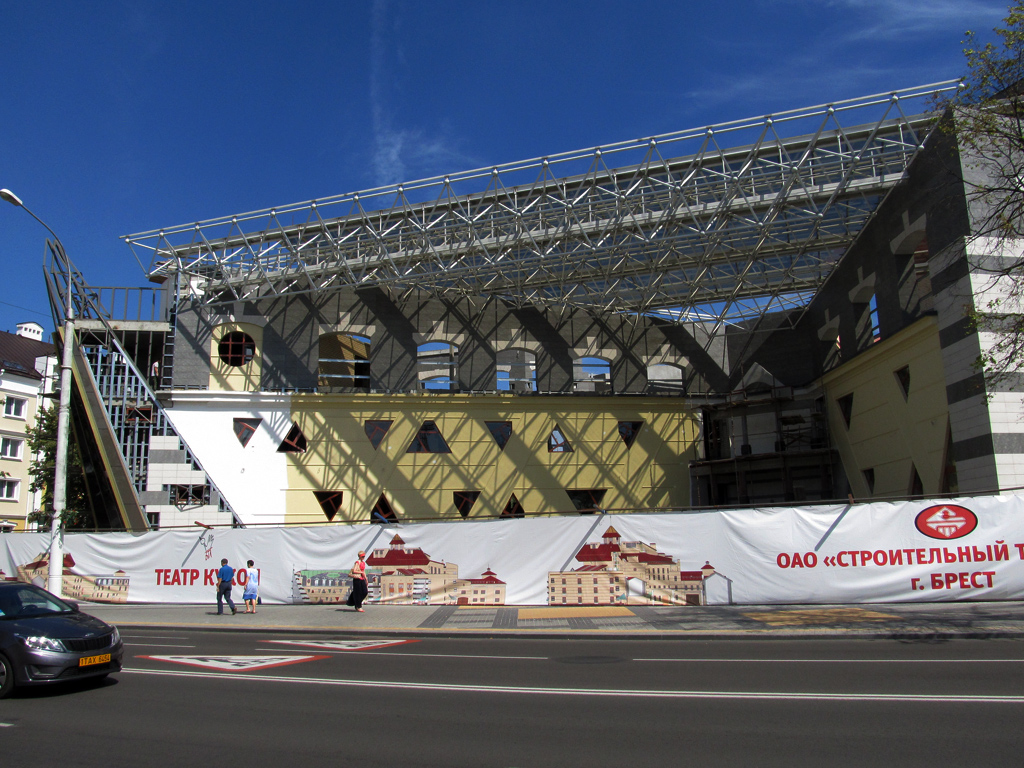 Брэст. Брэсцкі тэатр лялек на рэканструкцыі. Вуліца Леніна, 56